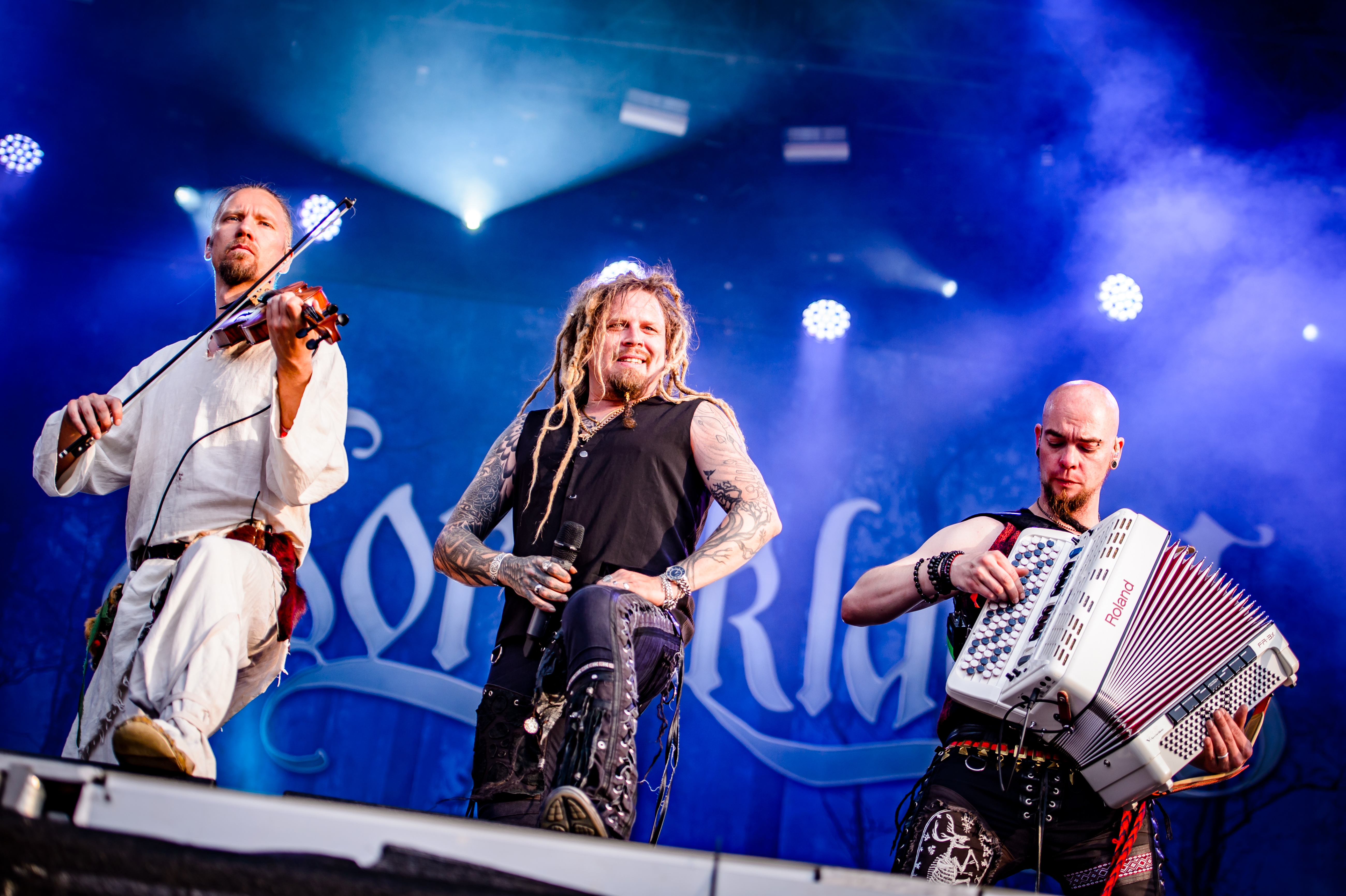 'RockHarz Open Air 2017; Ballenstedt': 'Korpiklaani'